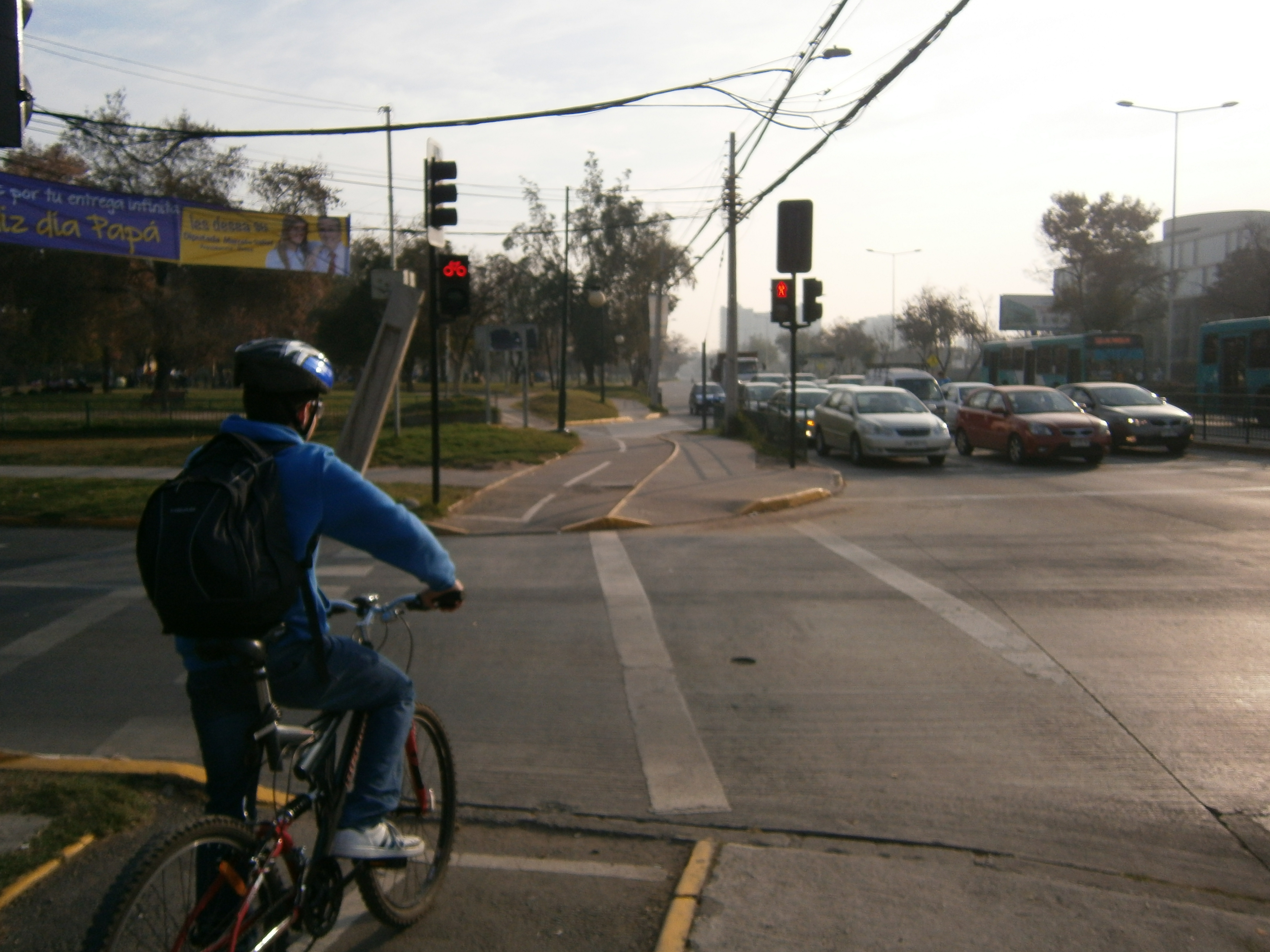 Ciclovía al sur de Avenida Grecia, en la comuna de Ñuñoa, Santiago de Chile